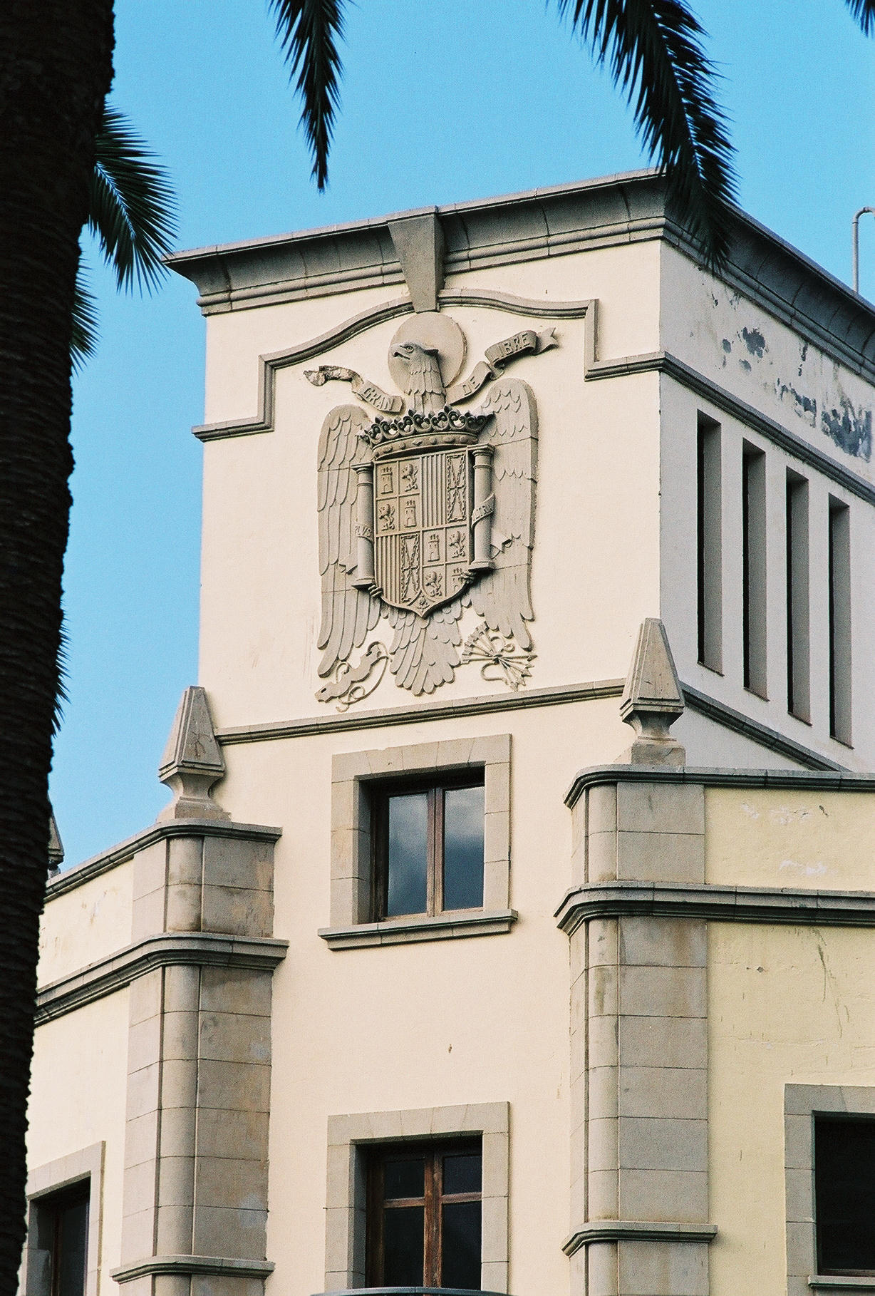 Franquistisches Emblem in La Orotava, Kanarische Inseln